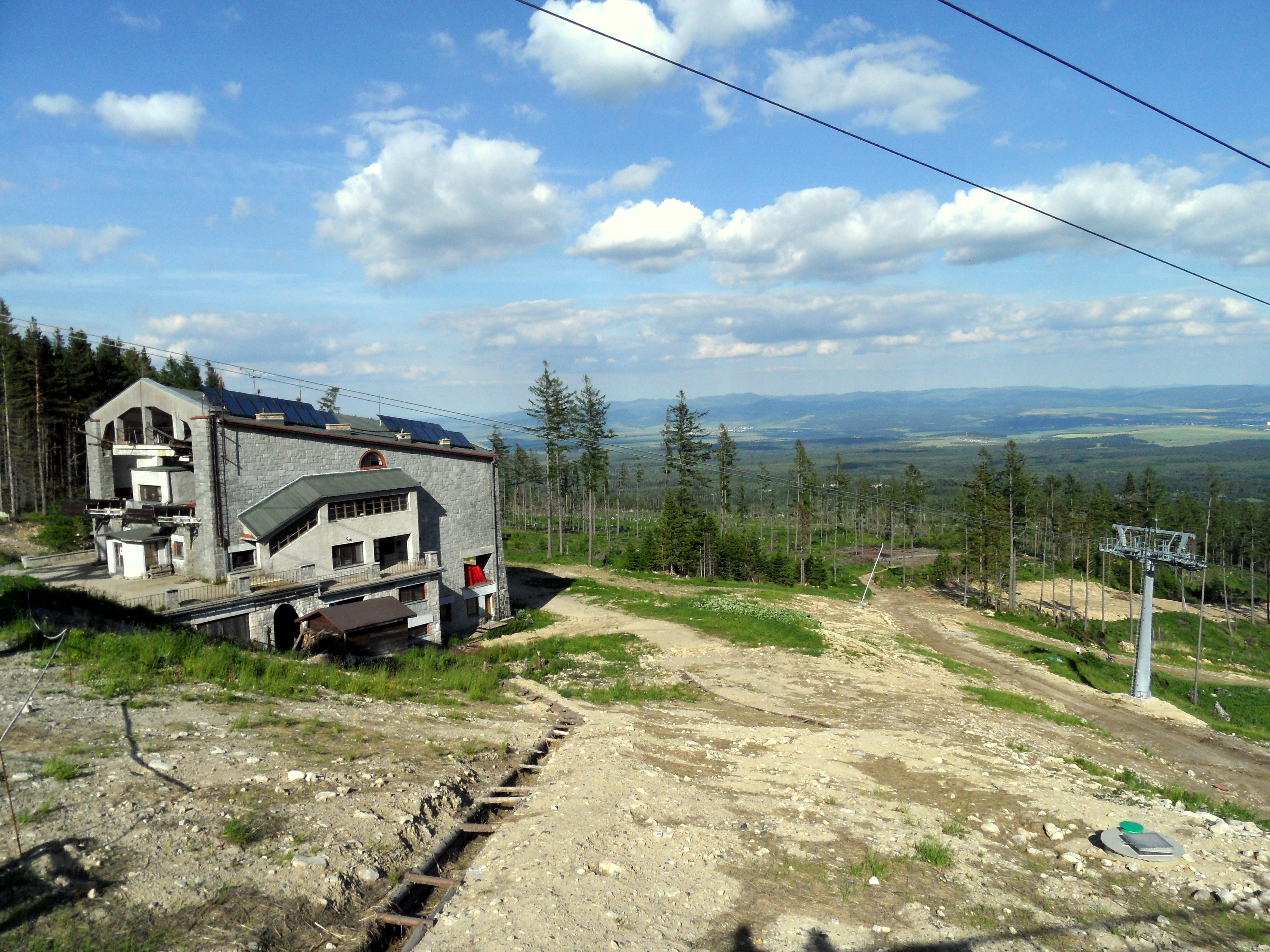 Medzistanica Štart